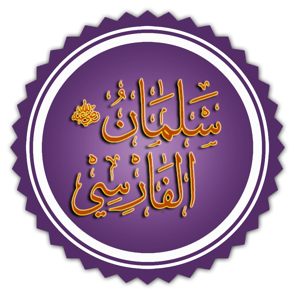 تخطيط اسم سلمان الفارسي رضي الله عنه